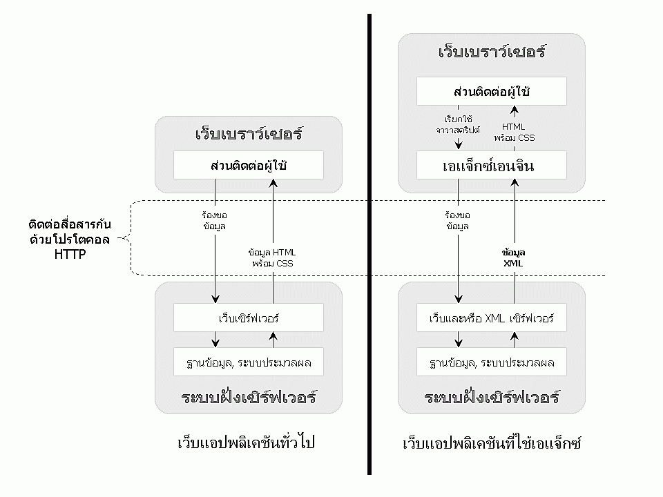 เป็น​ภาพที่สร้างขึ้นมา​โดย​อ้างอิง​จาก​ ​ภาพภาย​ใน​บท​ความ​ของคุณ​ Jesse James Garrett ​เรื่อง​ Ajax: A New Approach to Web Applications ที่​อยู่​ของบท​ความ​